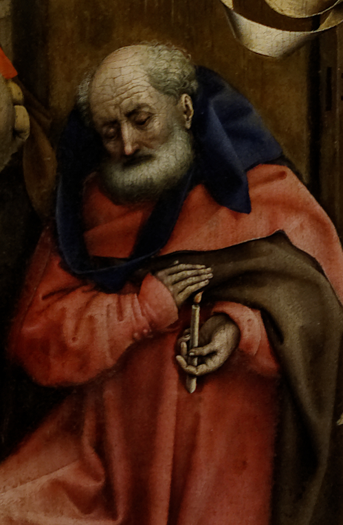 detail: Saint Joseph